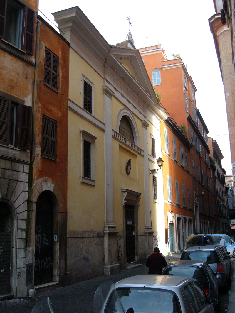 Chiesa di San Salvatore in Onda, a Roma, nel rione Regola.